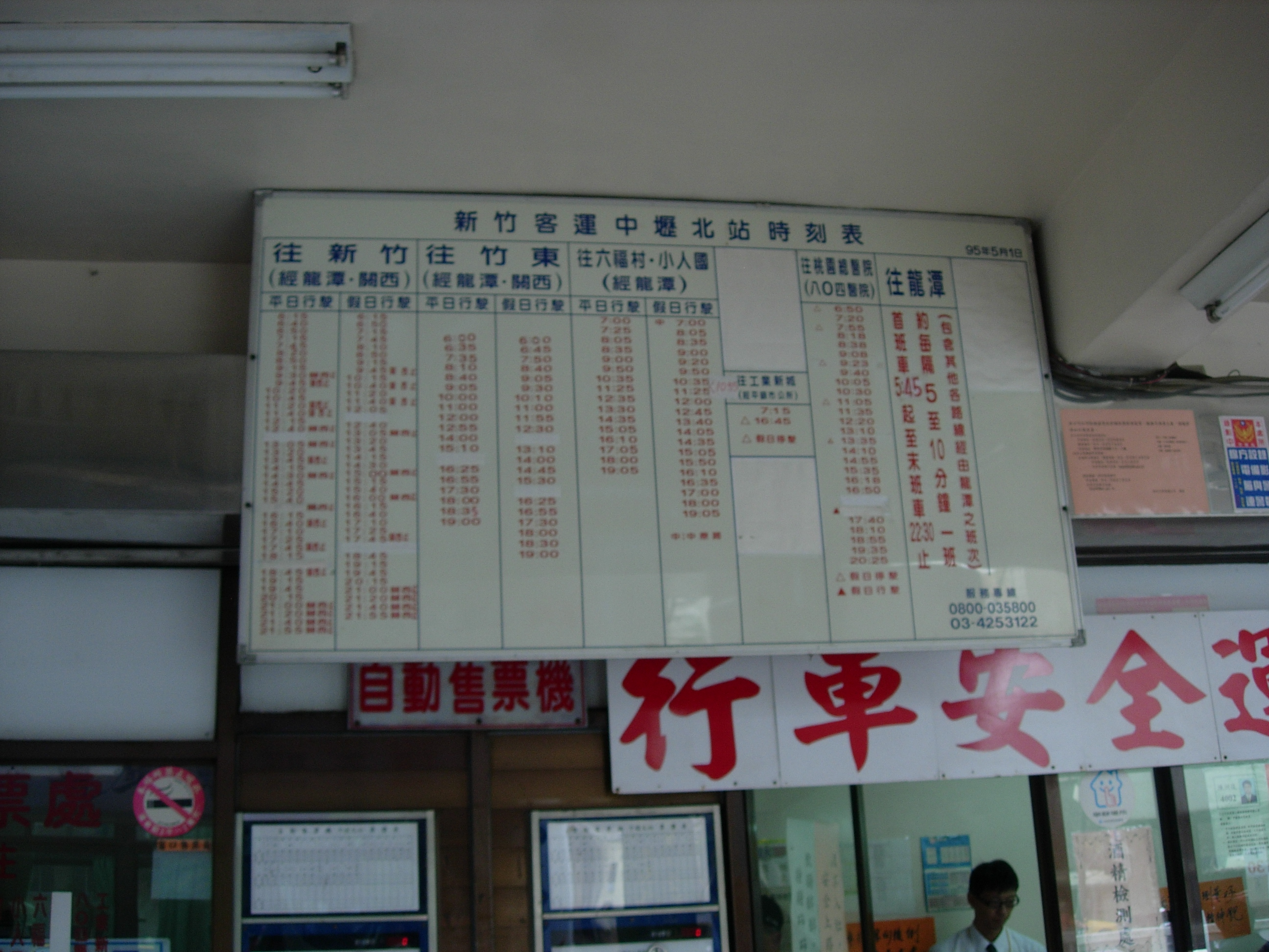 中文（台灣）: 新竹客運中壢北站時刻表